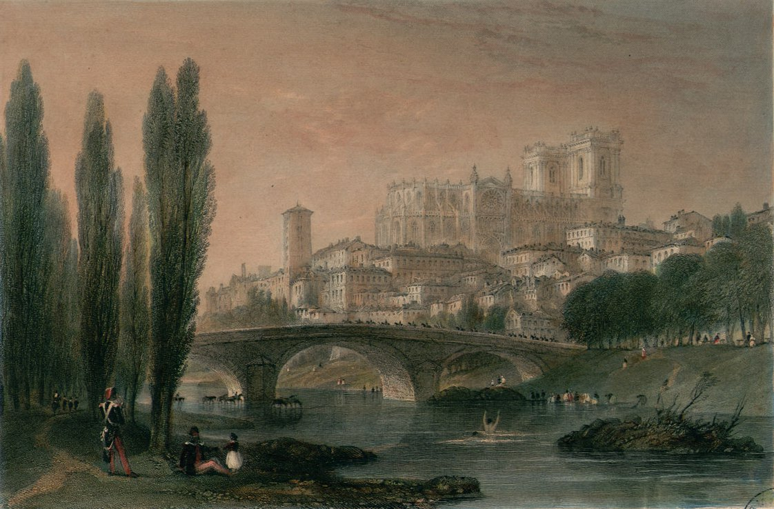 Die Stadt Auch, Pyrenäen